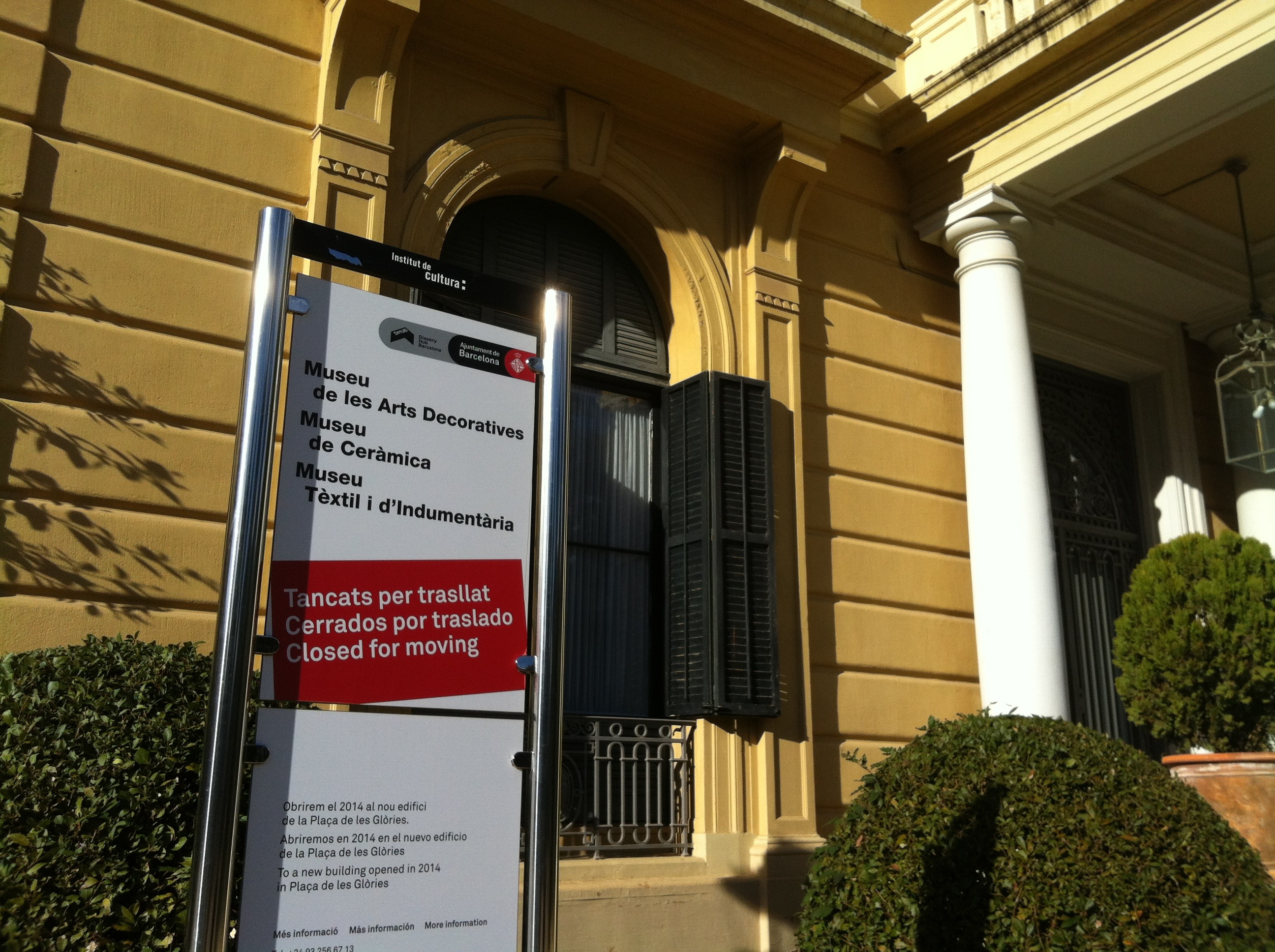 Tancament Museu d'Arts decoratives Barcelona